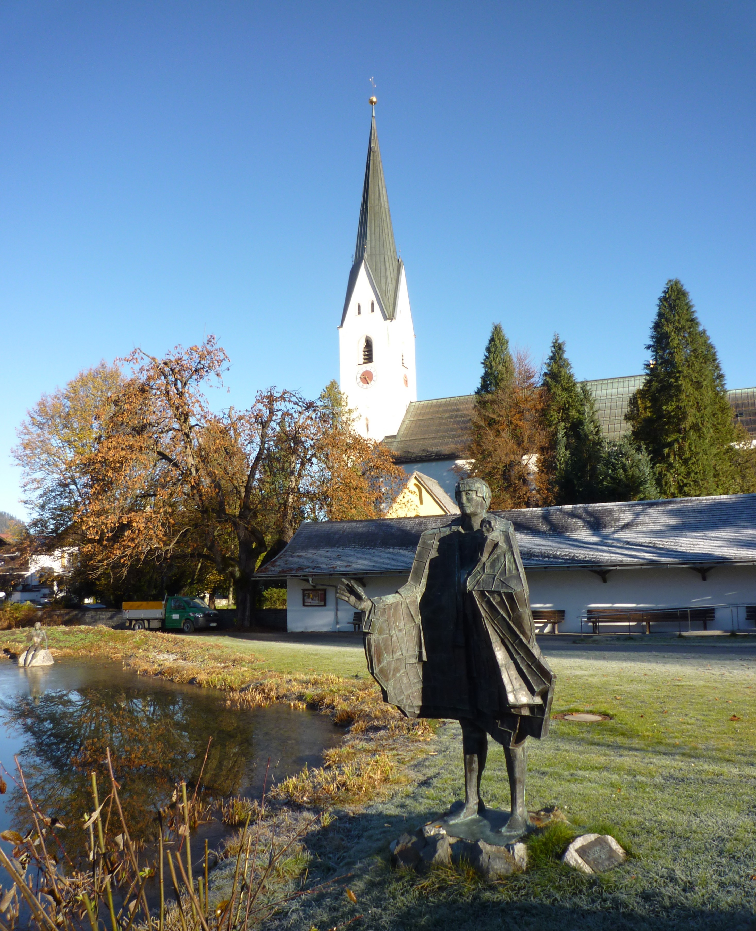 Oberstdorf - Skulptur St.Christophorus, Kirche